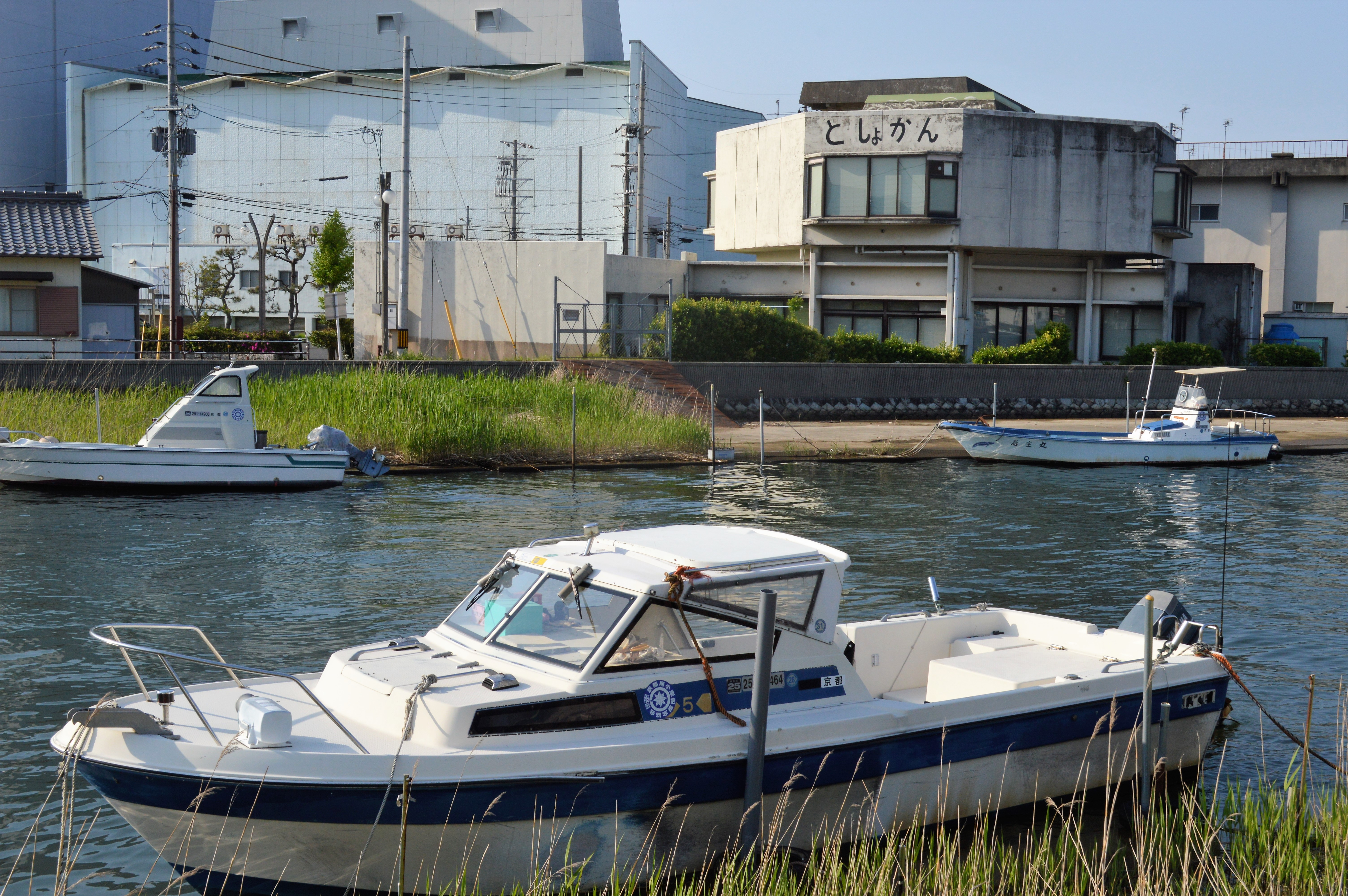 京都府宮津市を流れる大手川と宮津市立図書館。